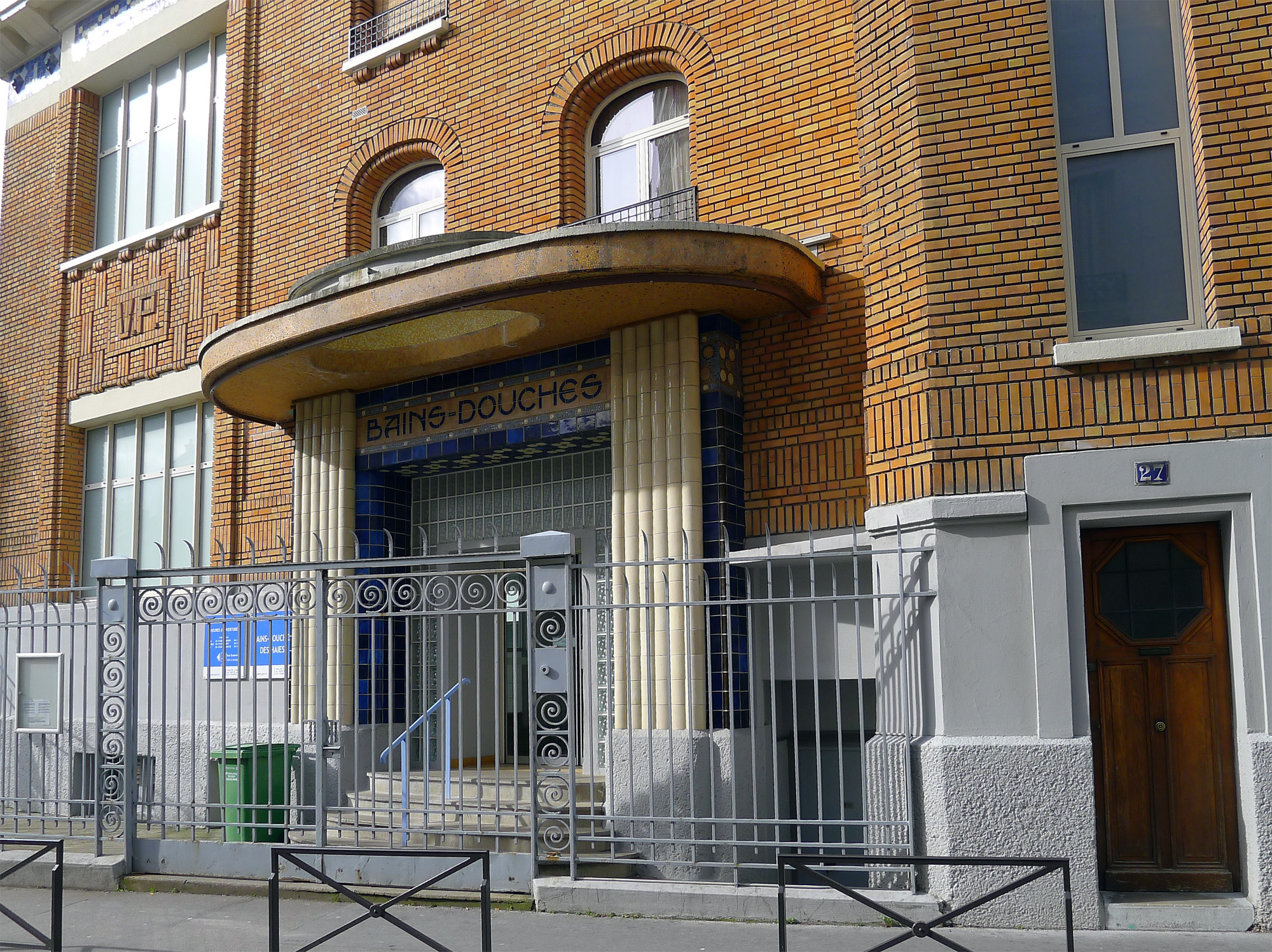 Rue des Haies (n27 : bains-douches) - Paris XX